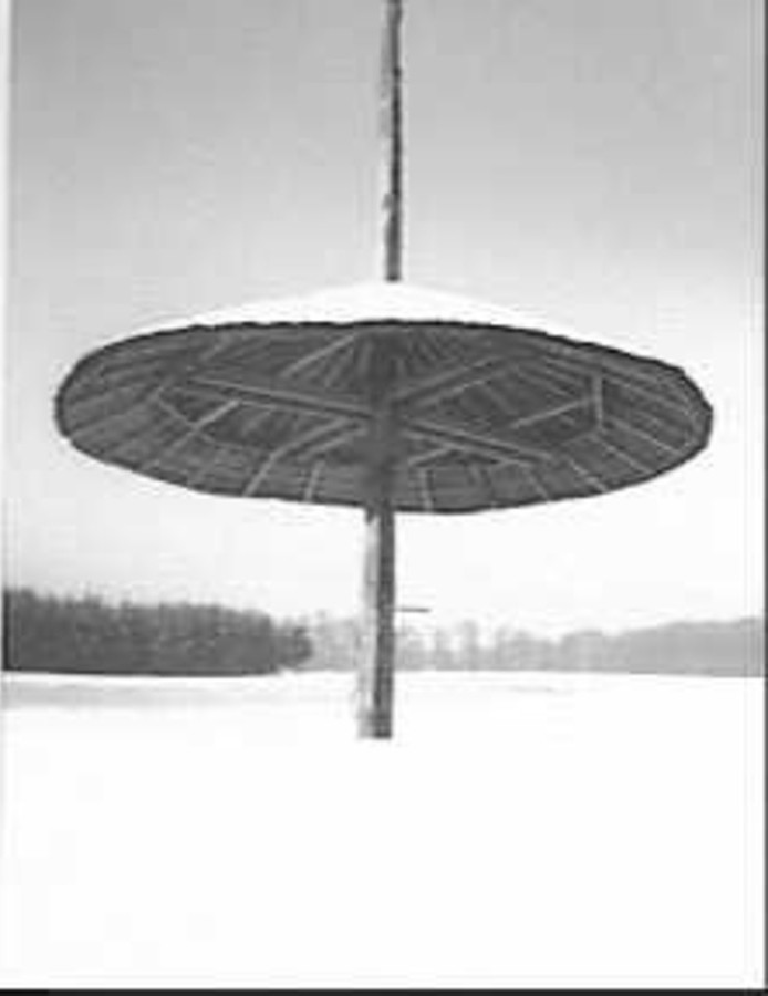 IJsselstreek/ Hooiberg: 1 roedeberg nr. Olst 45 (opmerking: Deze afbeelding hebben wij helaas alleen in deze lage resolutie.)